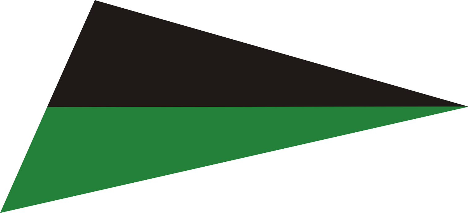 LWP - barwy broni na kołnierze kurtek obowiązujące od stycznia 1945 - artyleria lekka